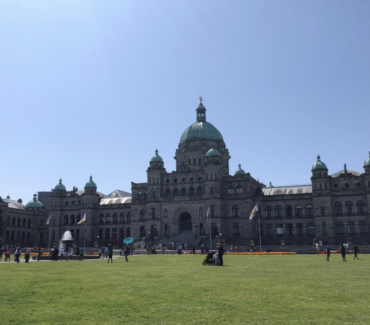 ブリティッシュコロンビア州 現地時間8月5日13:50撮影